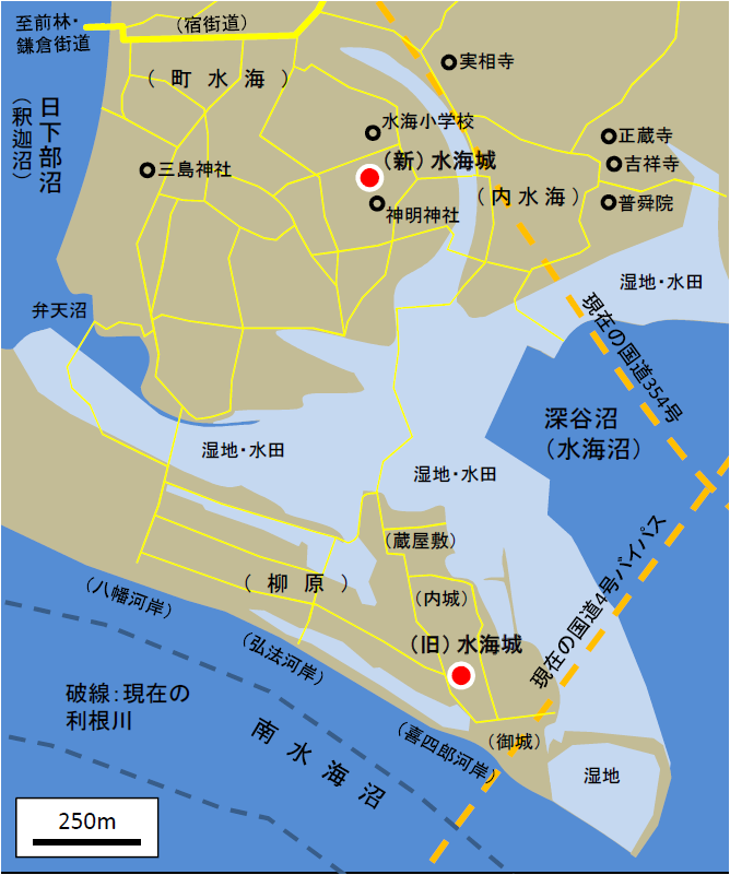 茨城県古河市にあった水海城の周辺図 参考文献： 総和町史編さん委員会 編『総和町史 通史編 原始・古代・中世』、総和町、平成17年（2005年）、490頁（中世都市水海の性格と推移・内山俊身執筆）